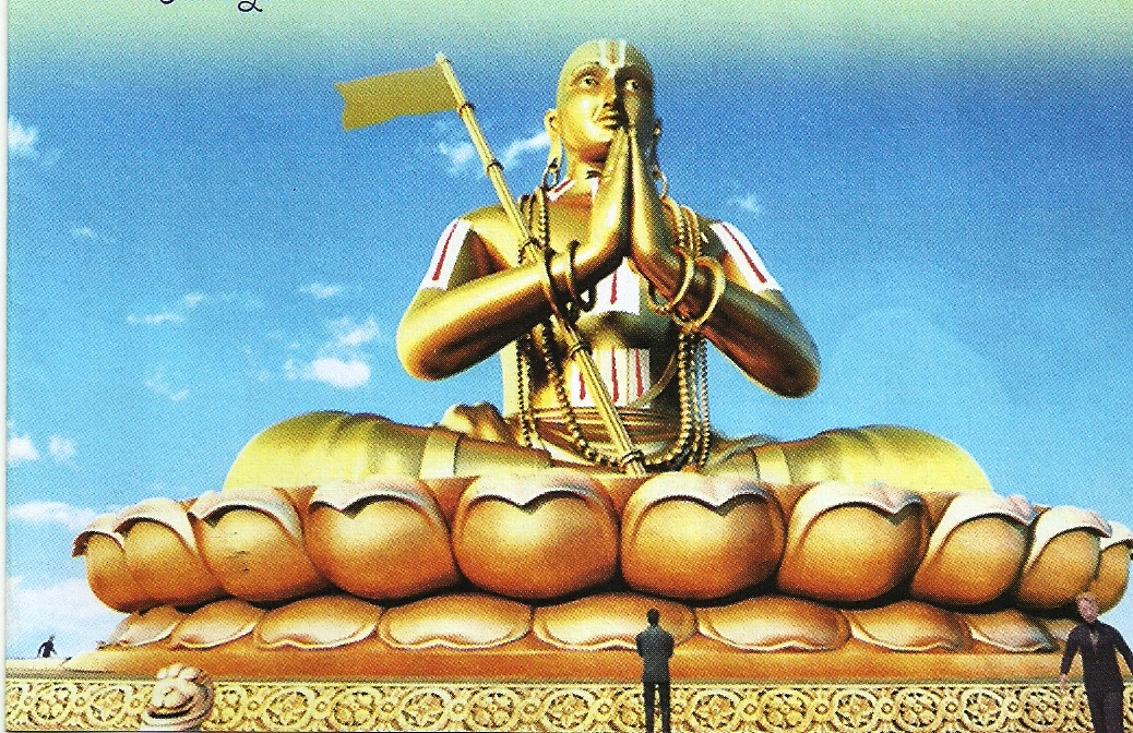 శ్రీమద్ర్రామానుజులు